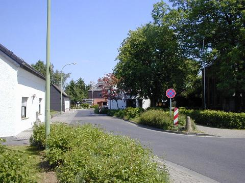 Hauptdurchgangsstraße in Rath, einem Ortsteil der Gemeinde Nörvenich